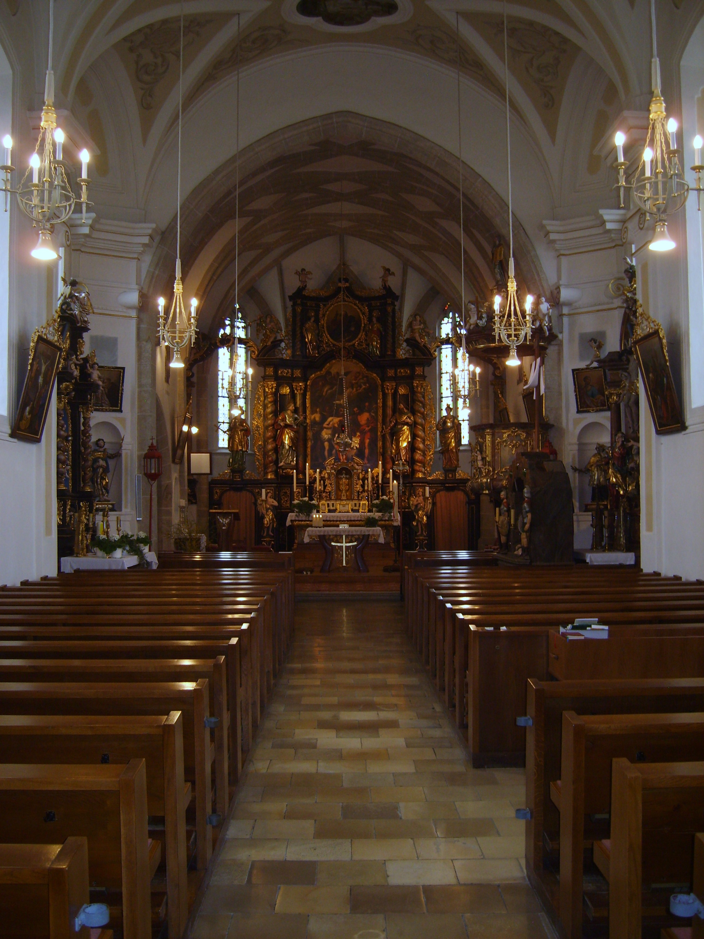 Innenansicht der Pfarrkirche St. Johann am Wimberg Richtung Chor